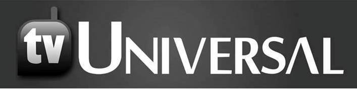 Tv Universal Logo